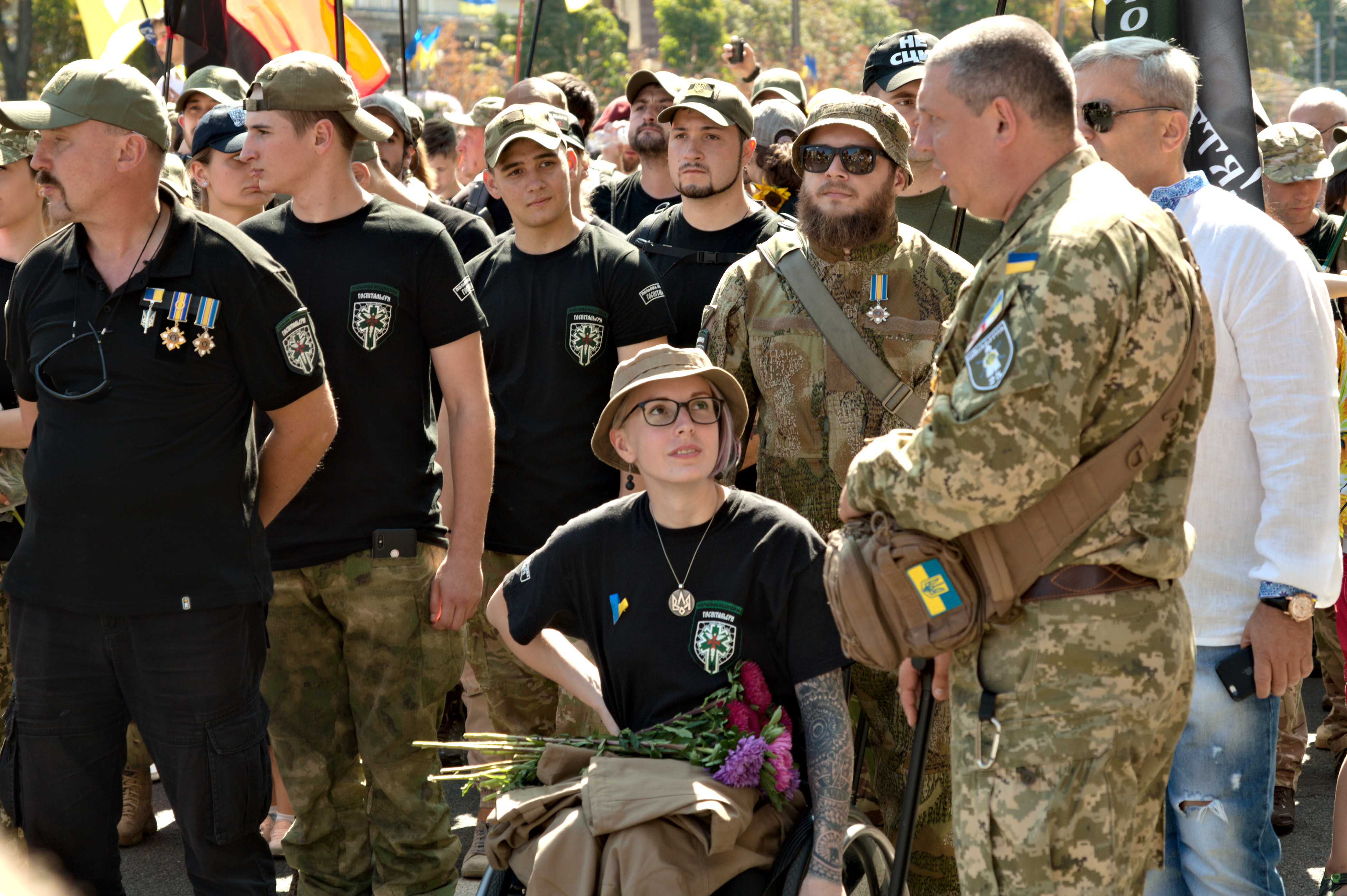 Ветерани війни на сході України з медичного батальйону «Госпітальєри»